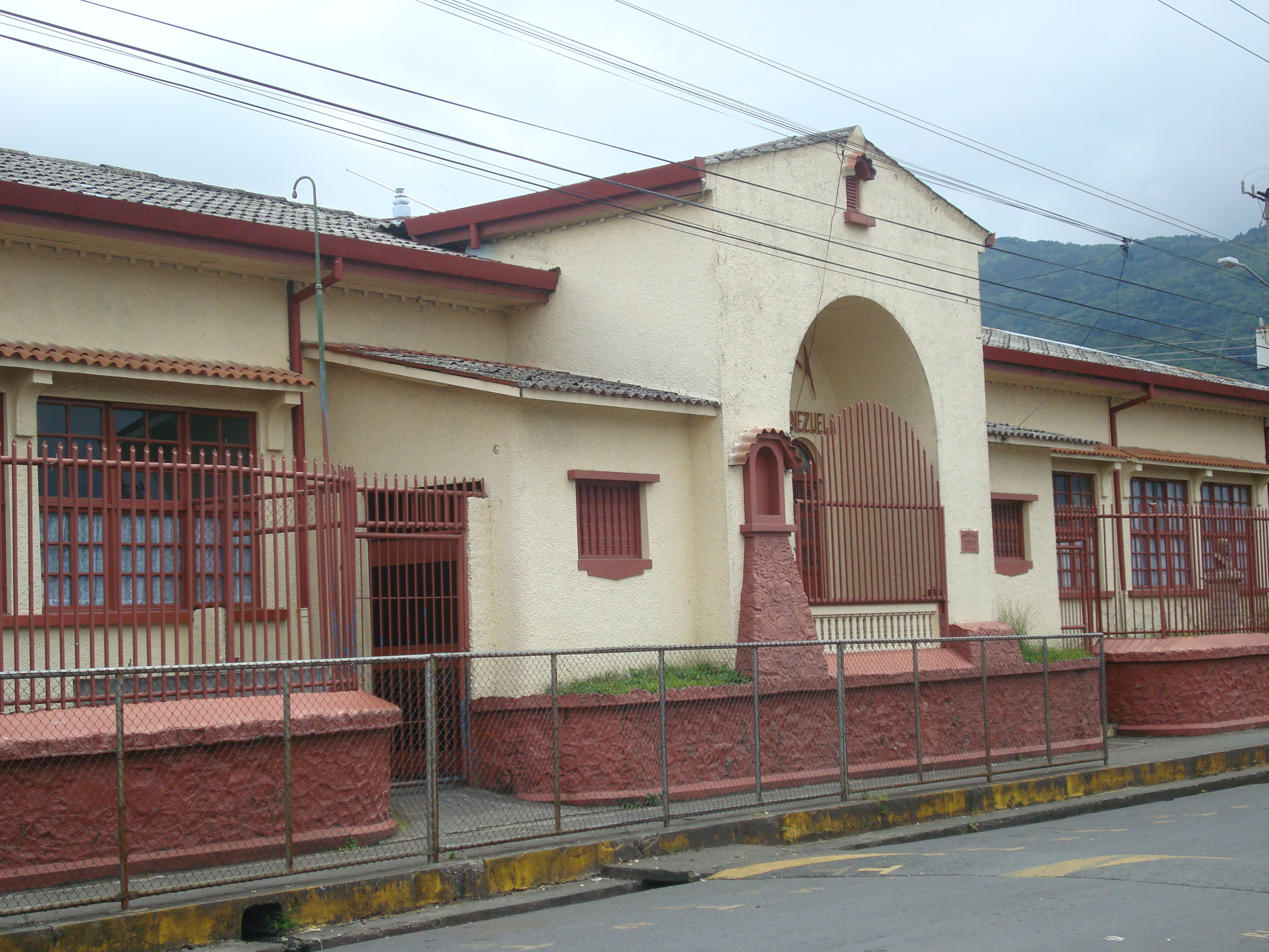 Escuela República de Venezuela, en Escazú, Costa Rica.